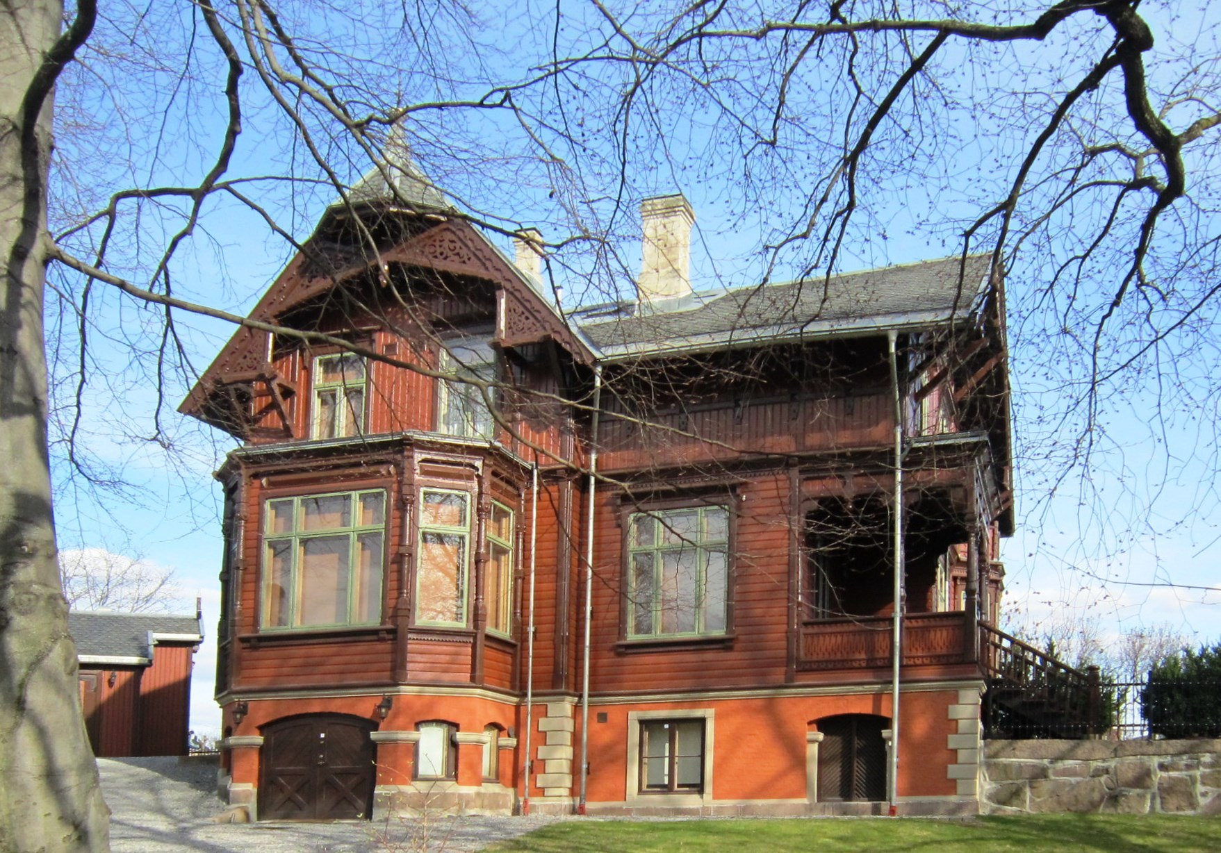 Kruses gate 9A på Frogner i Oslo